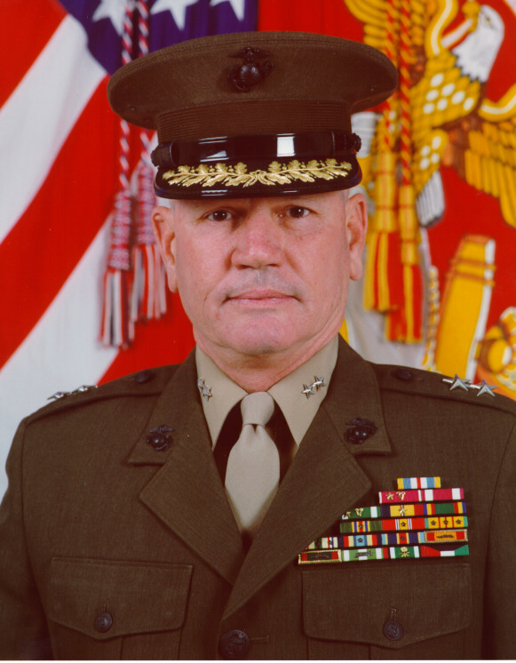 Major General